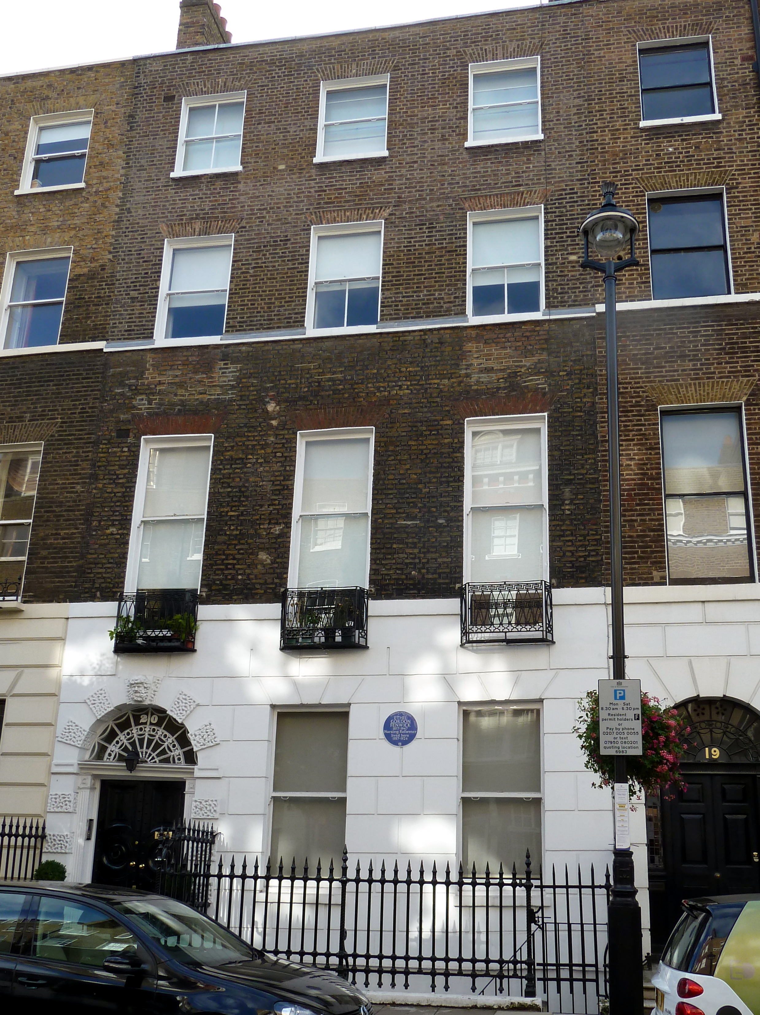 Ethel Gordon Fenwick